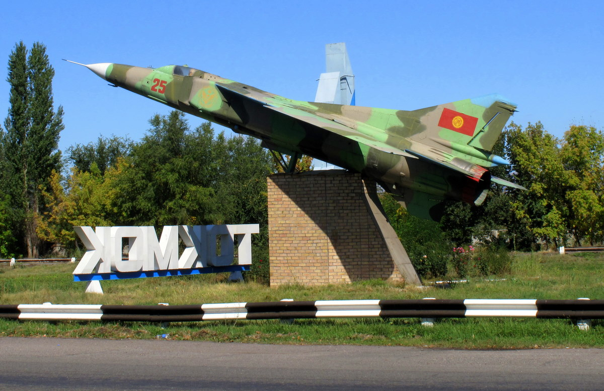 Mig-23 in Tokmok.